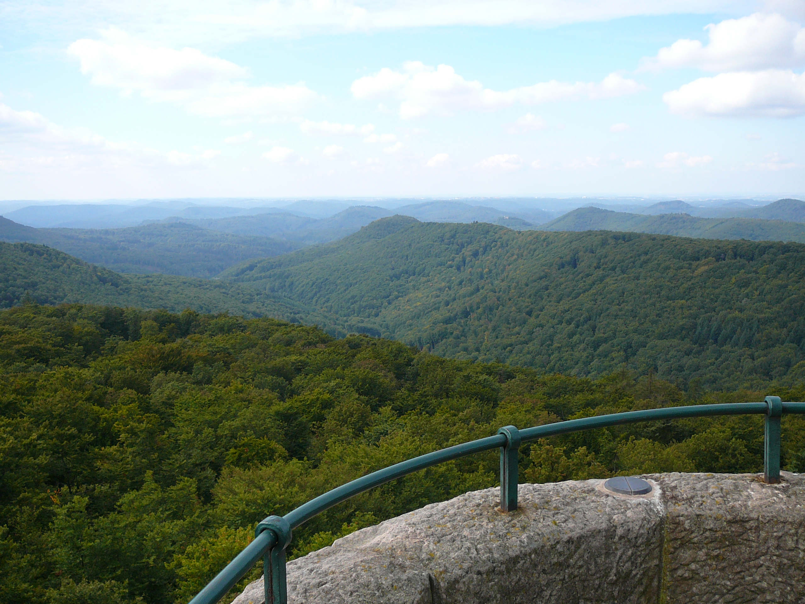 Quellbäche der Lauter: Blick vom Weißenberg ins Wartenbachtal